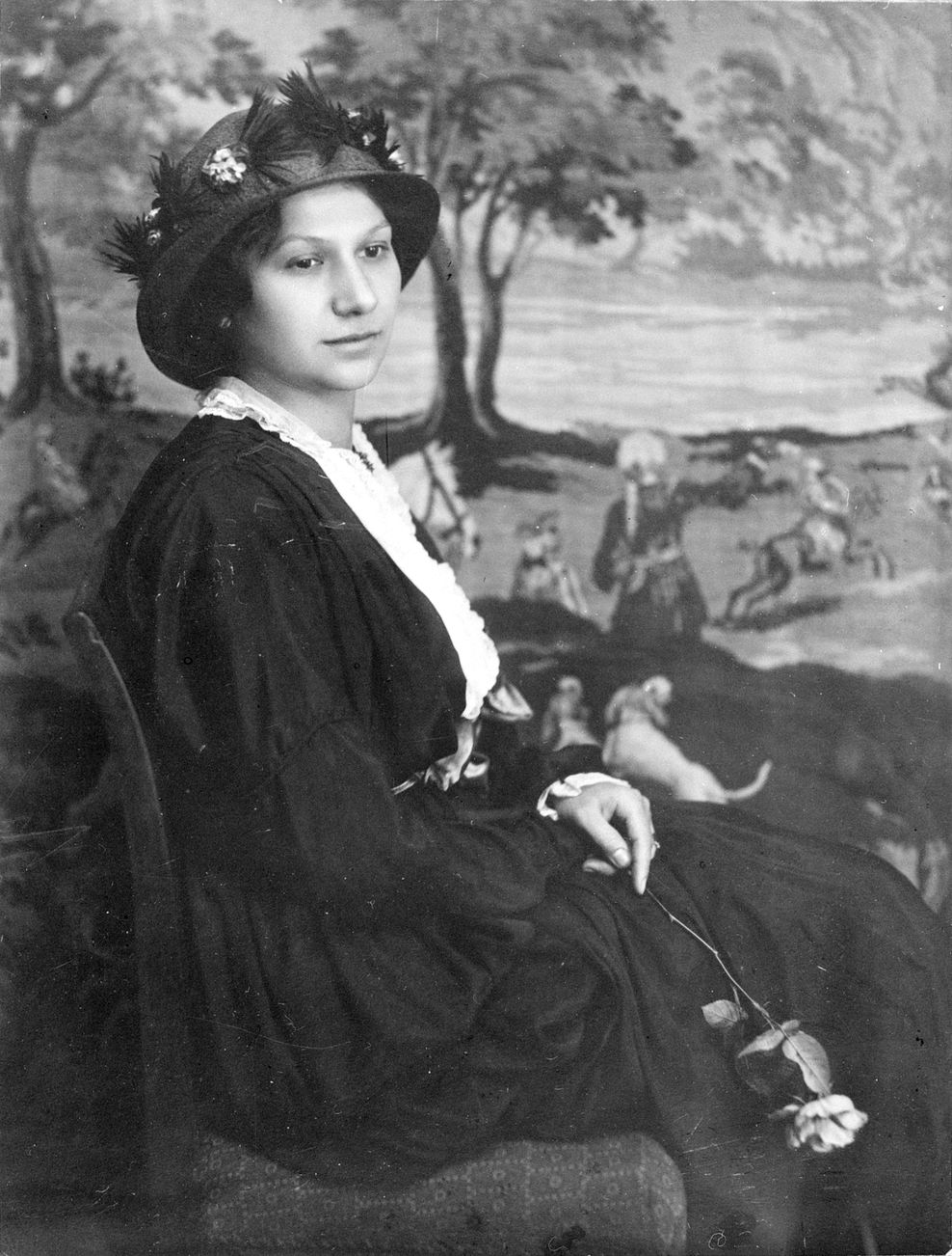 Móricz Zsigmondné Holics Eugénia, Janka